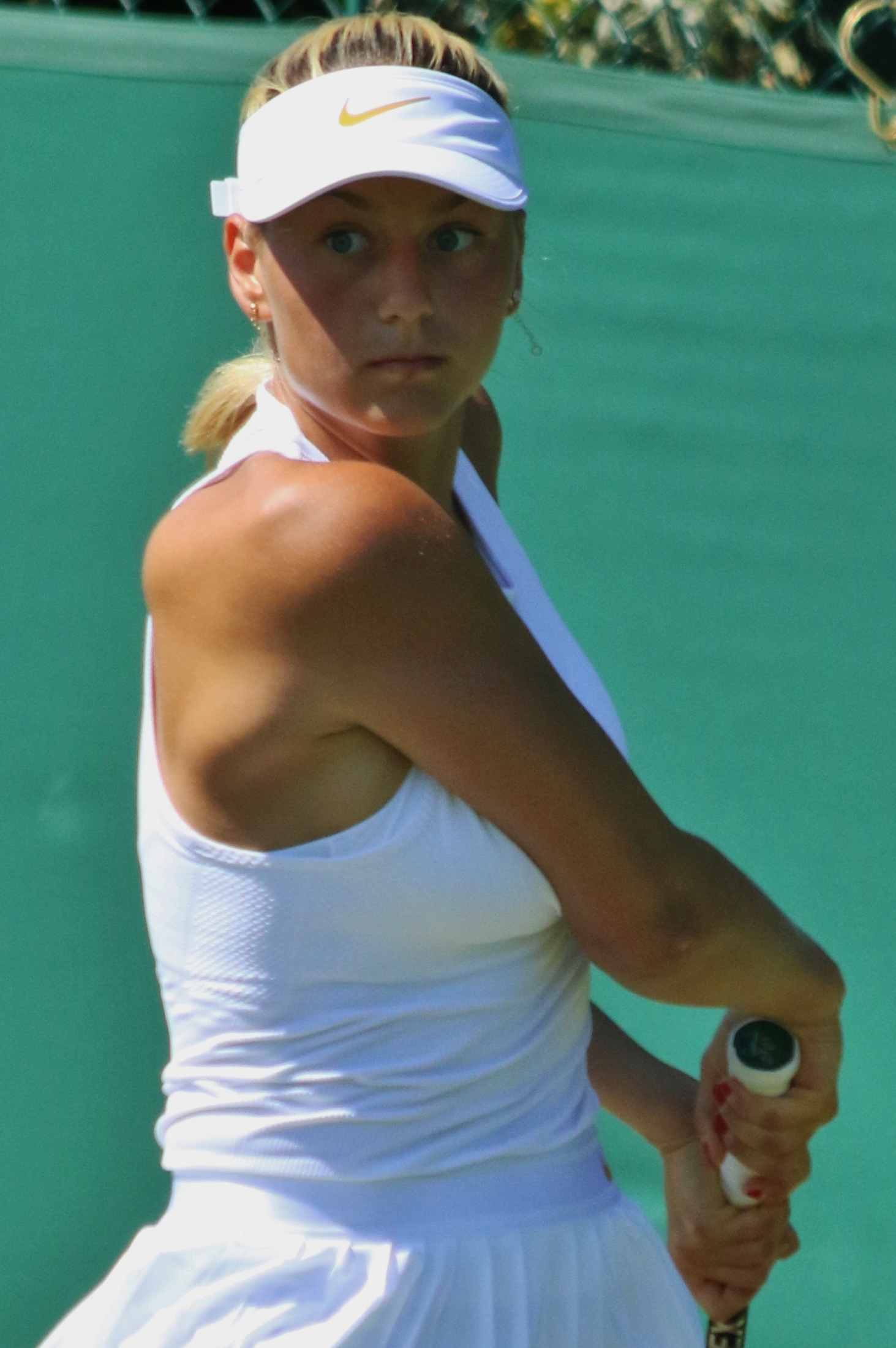 Kostyuk WMQ18 (11)